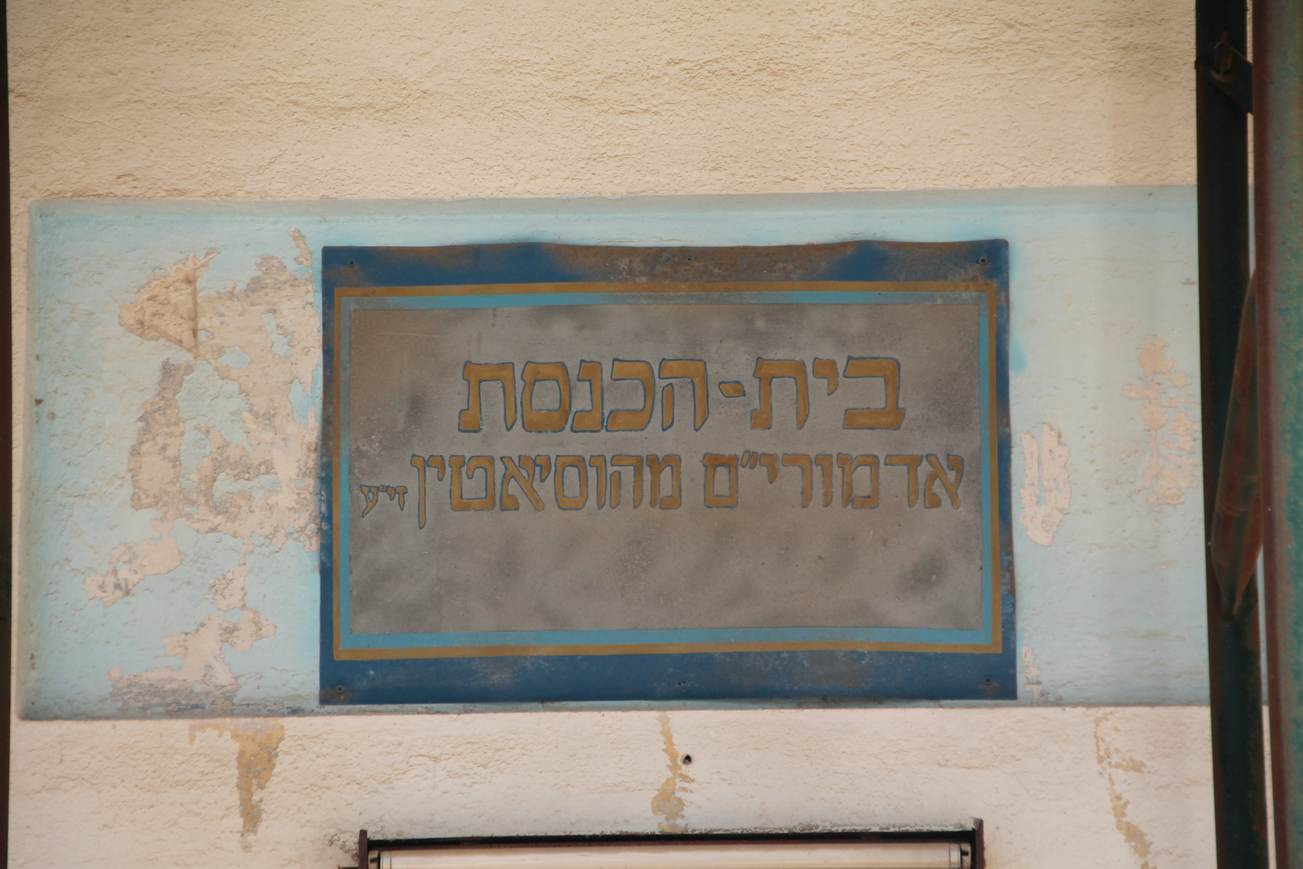 כיתוב בית הכנסת של האדמו"ר מהוסיאטין